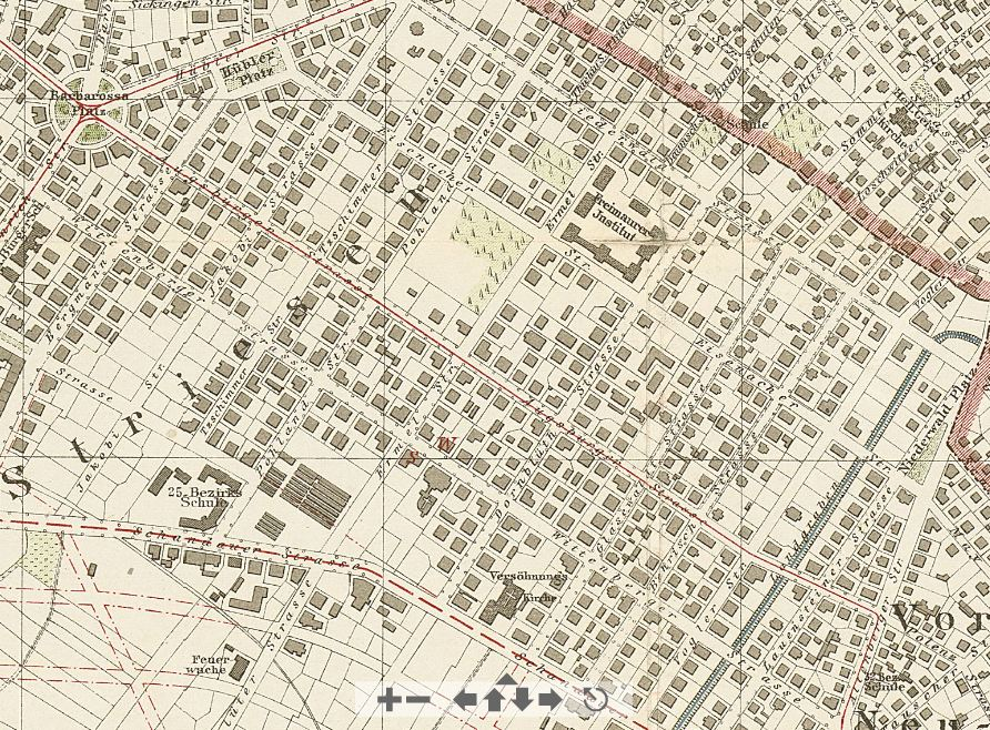 Dresdner Stadtplan 1907. Bearb. vom Vermessungsamt der Stadt Dresden. Gerke, 1:10 000. 21. Aufl. Dresden: Verl. d. Buchdruckerei d. Dr. Güntzschen Stiftung 1906.